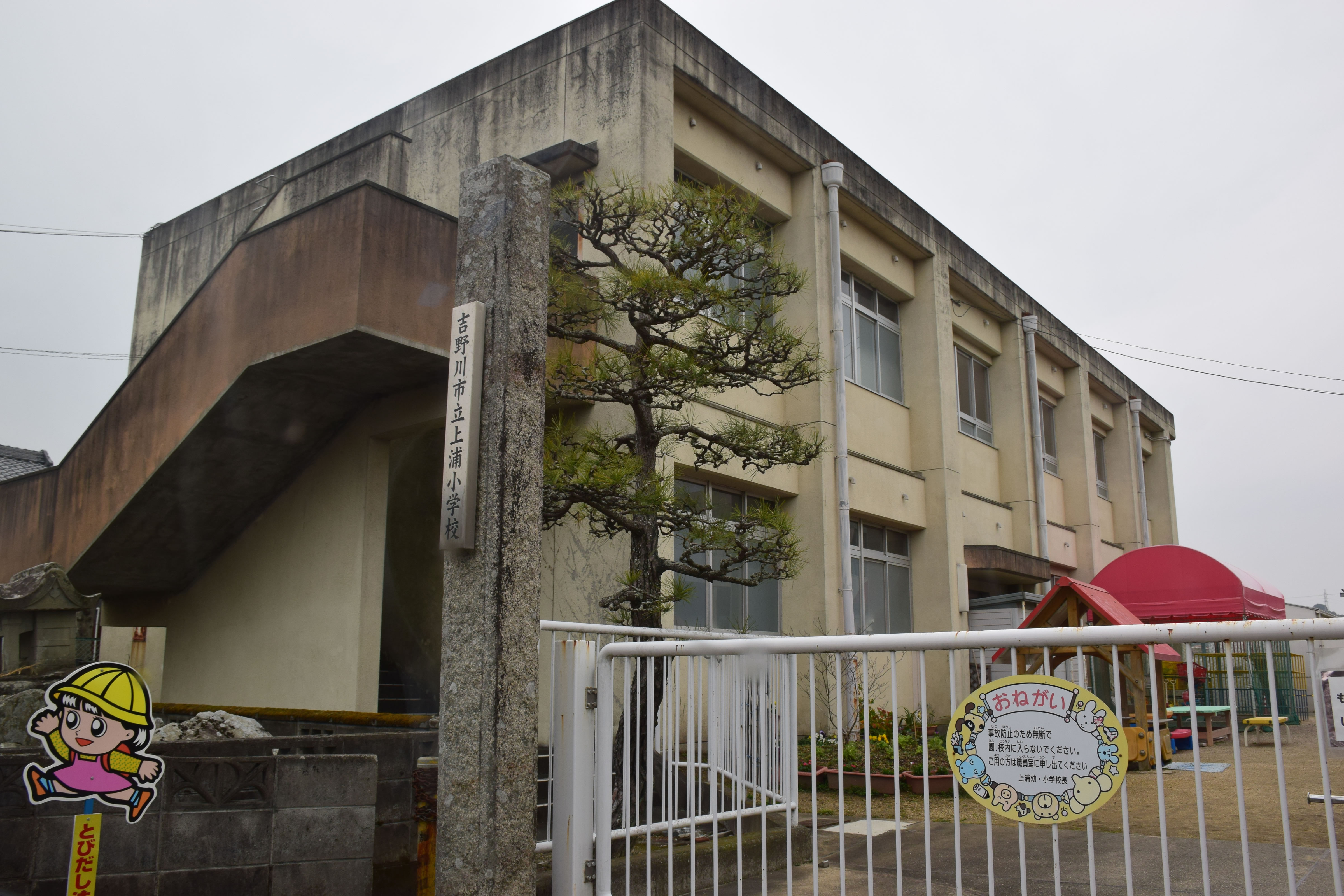 吉野川市立上浦小学校